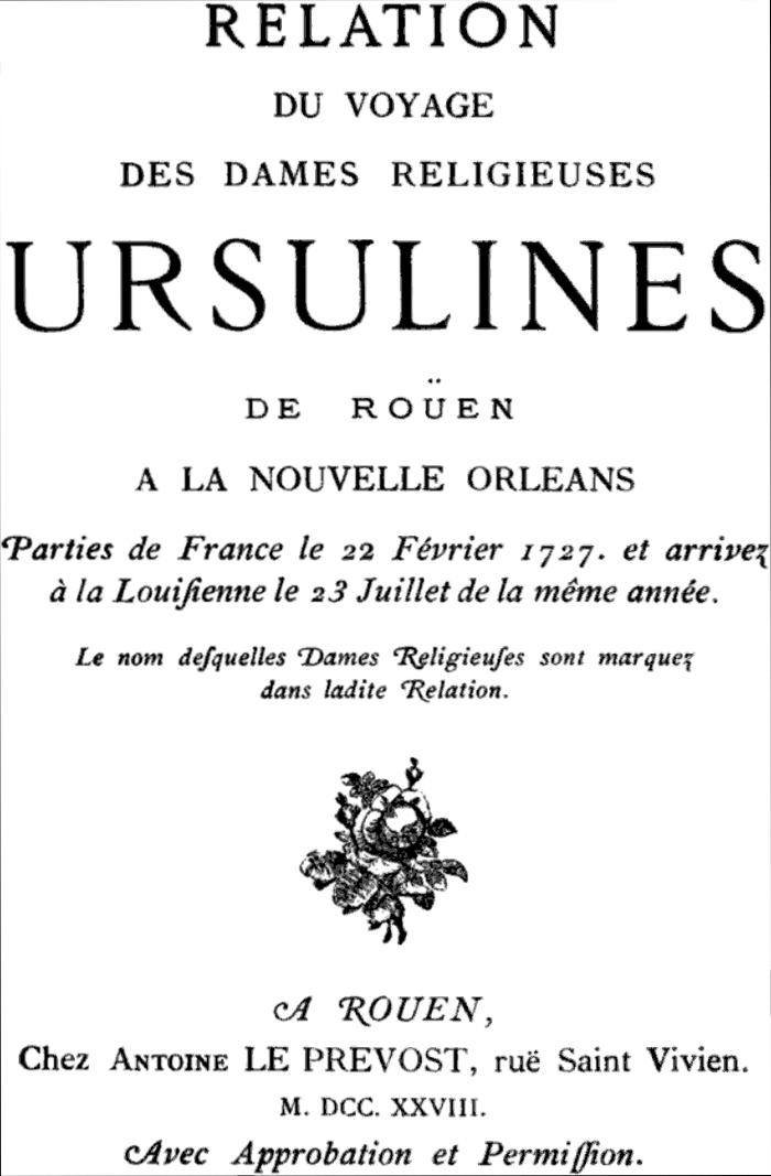 Cover of Marie-Madeleine Hachard's Relation du voyage des dames religieuses Ursulines de Roüen à la Nouvelle Orléans